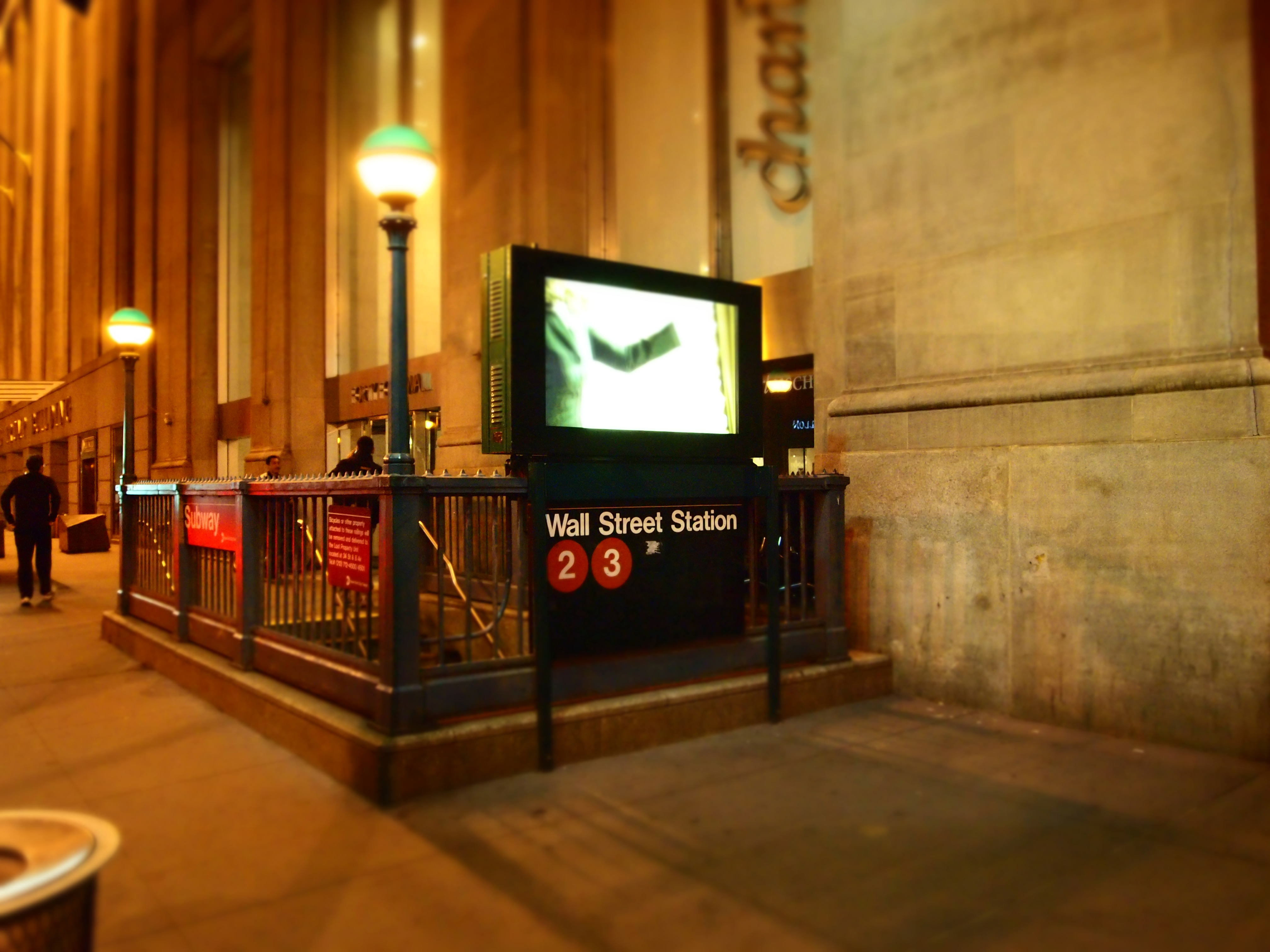 Вход в метро на Wall-street (Нью-Йорк).